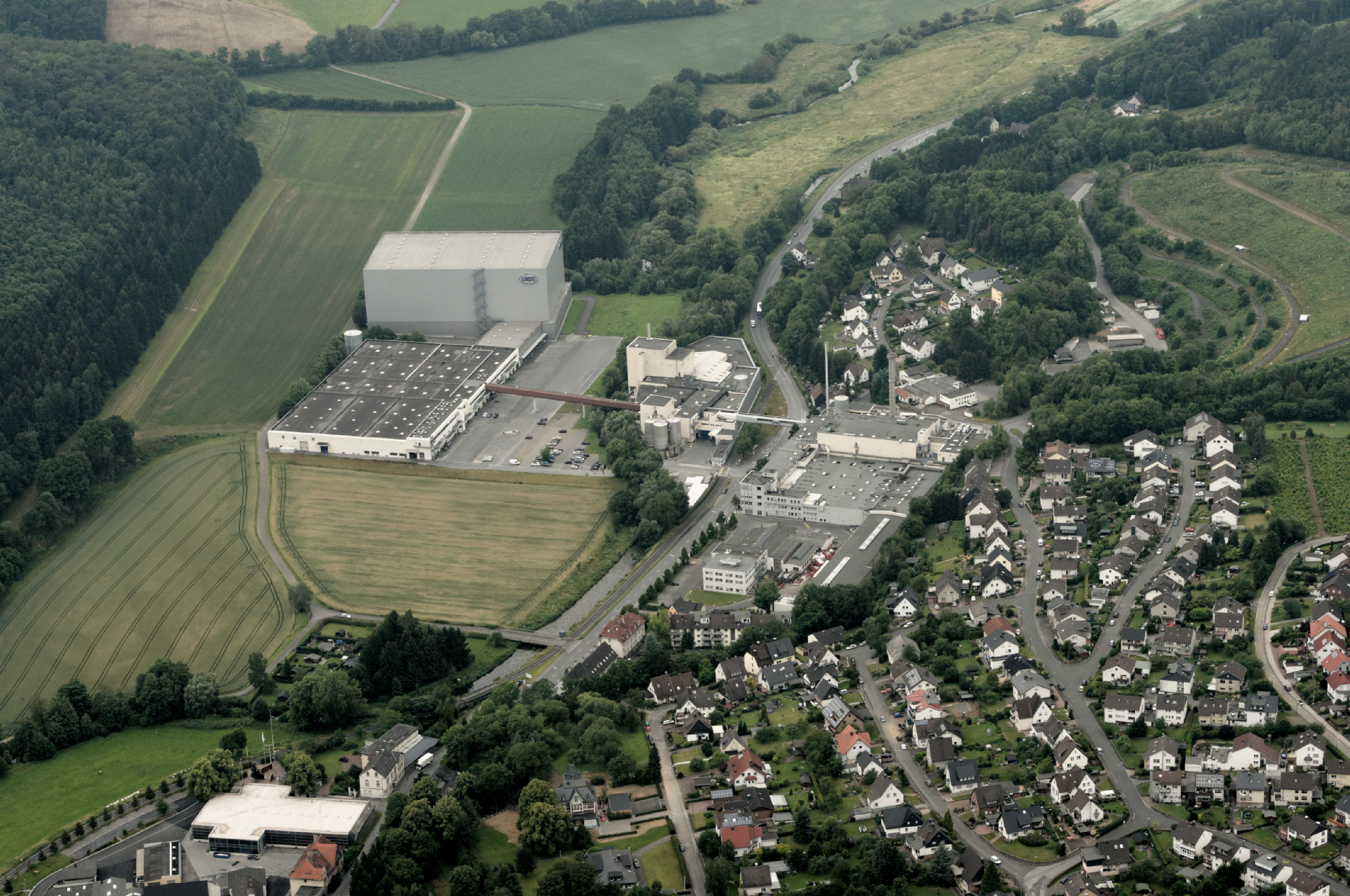 Fotoflug Sauerland Nord. Arnsberg-Müschede, Werksgebäude der Fa. Wepa Papierfabrik, Röhr im Naturschutzgebiet Röhrtal, Bundesstraße 229, Röhrtalbahn, Blickrichtung Nord The making of this document was supported by the Community-Budget of Wikimedia Germany.